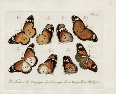 Plate from Natursystem aller bekannten in- und ausländischen Insecten, als eine Fortzetsung der von Büffonschen Naturgeschichte.